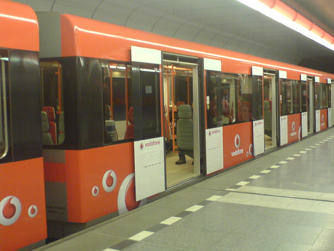 Souprava v reklamním nátěru (od září 2007) ve stanici Ládví. Reklamní souprava- Vodafone.